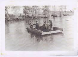 El barquero trasladando gente en el río Órbigo a su paso por Navianos de la Vega